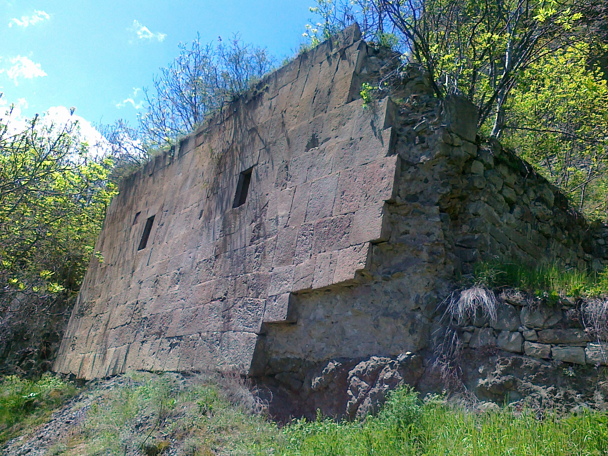 საფარა. ჯაყელთა სასახლი ნანგრევები